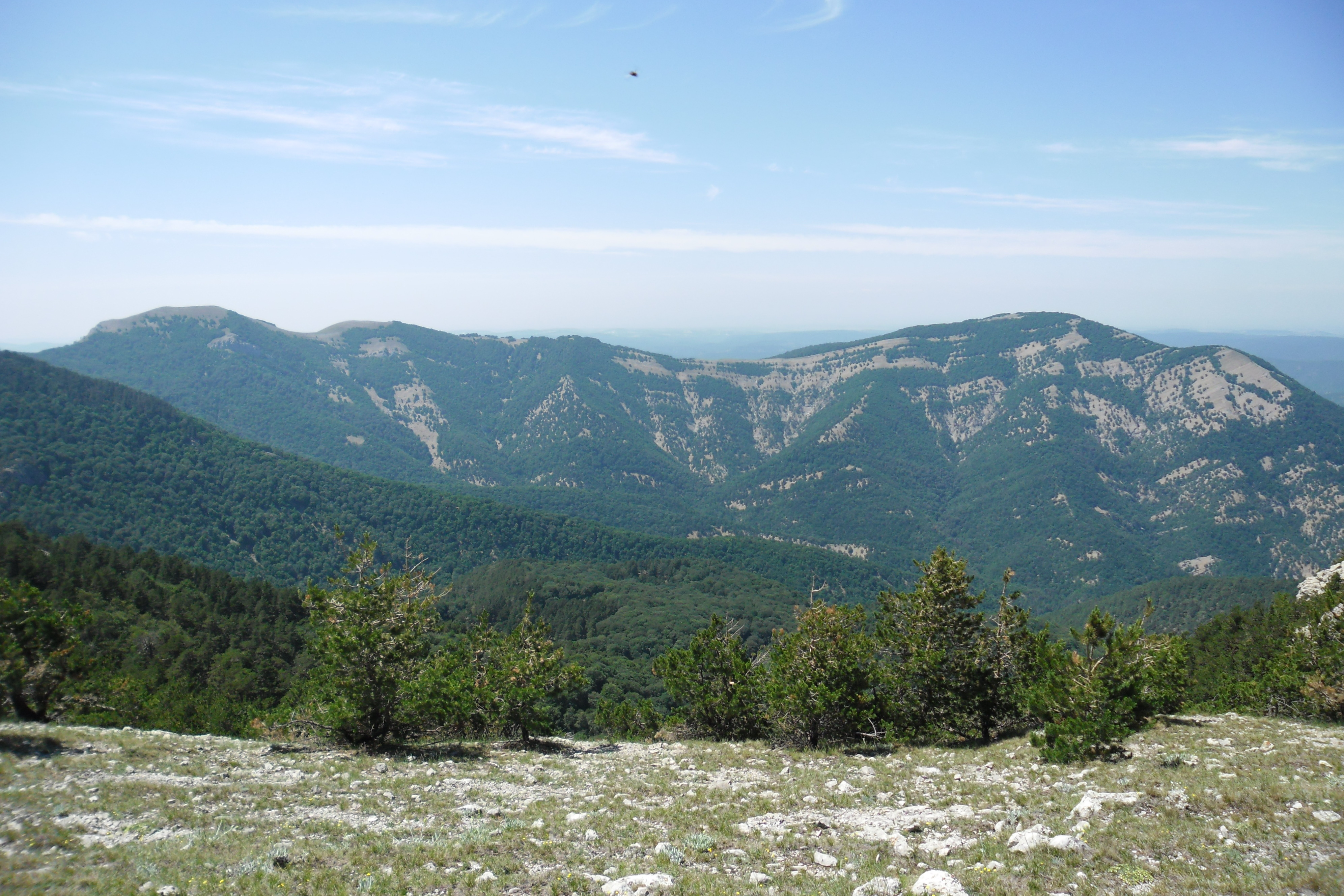 Синап-Даг: Фото